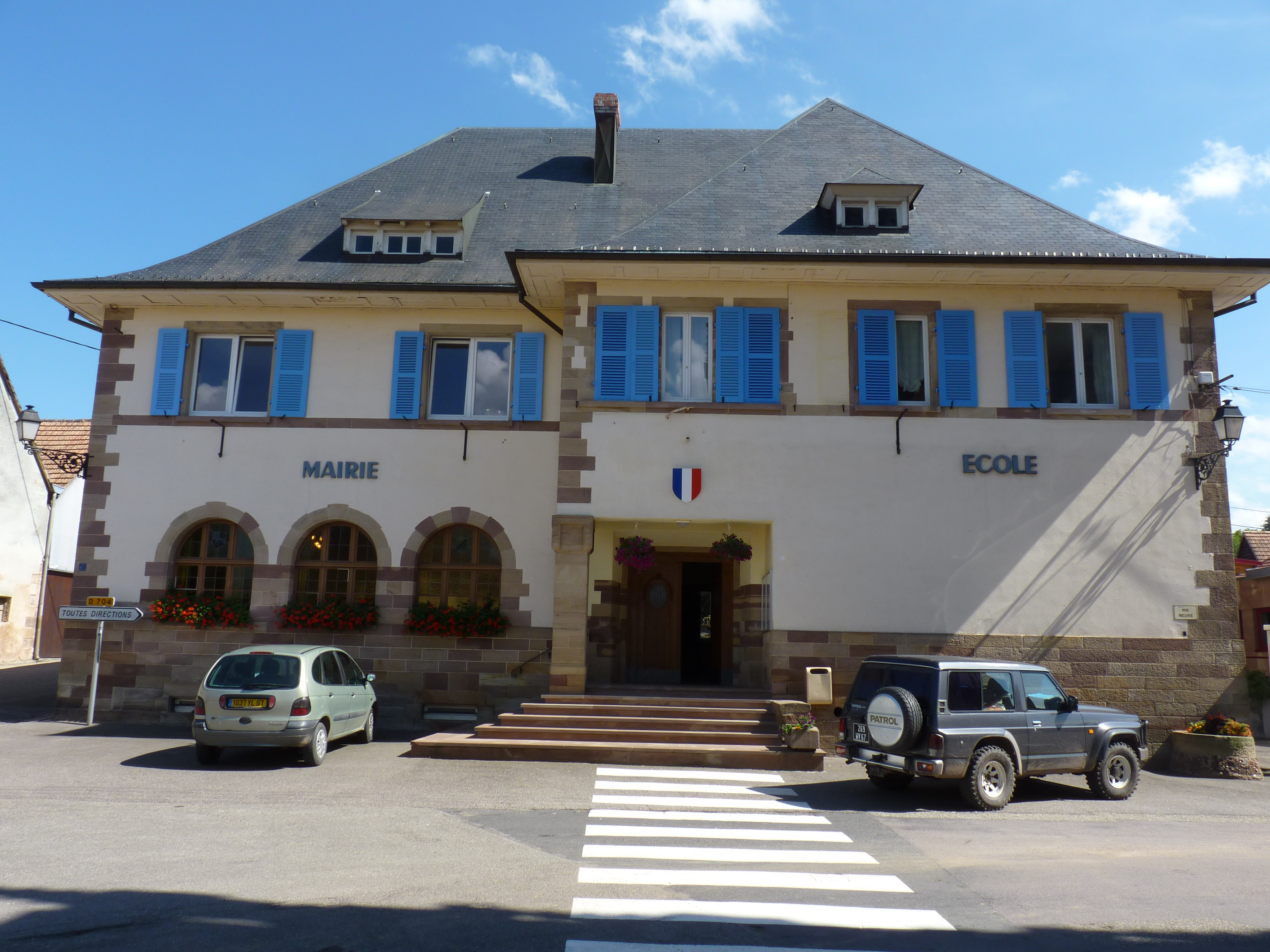 Mairie-école de Heiligenberg